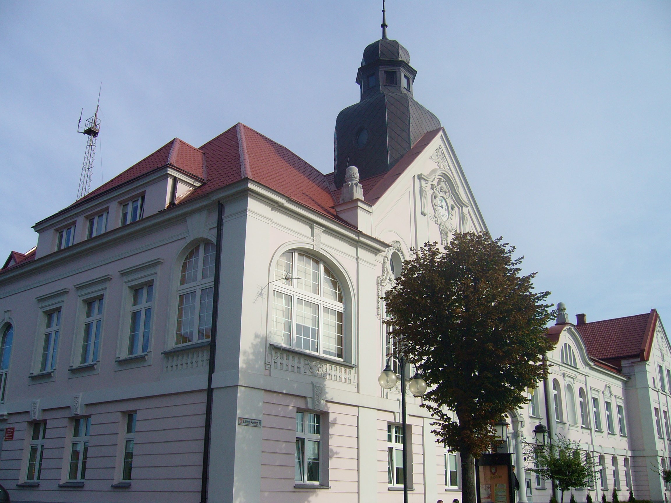 Człuchów, Aleja Wojska Polskiego 1 - ratusz